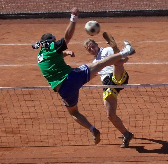 Nohejbalová akce